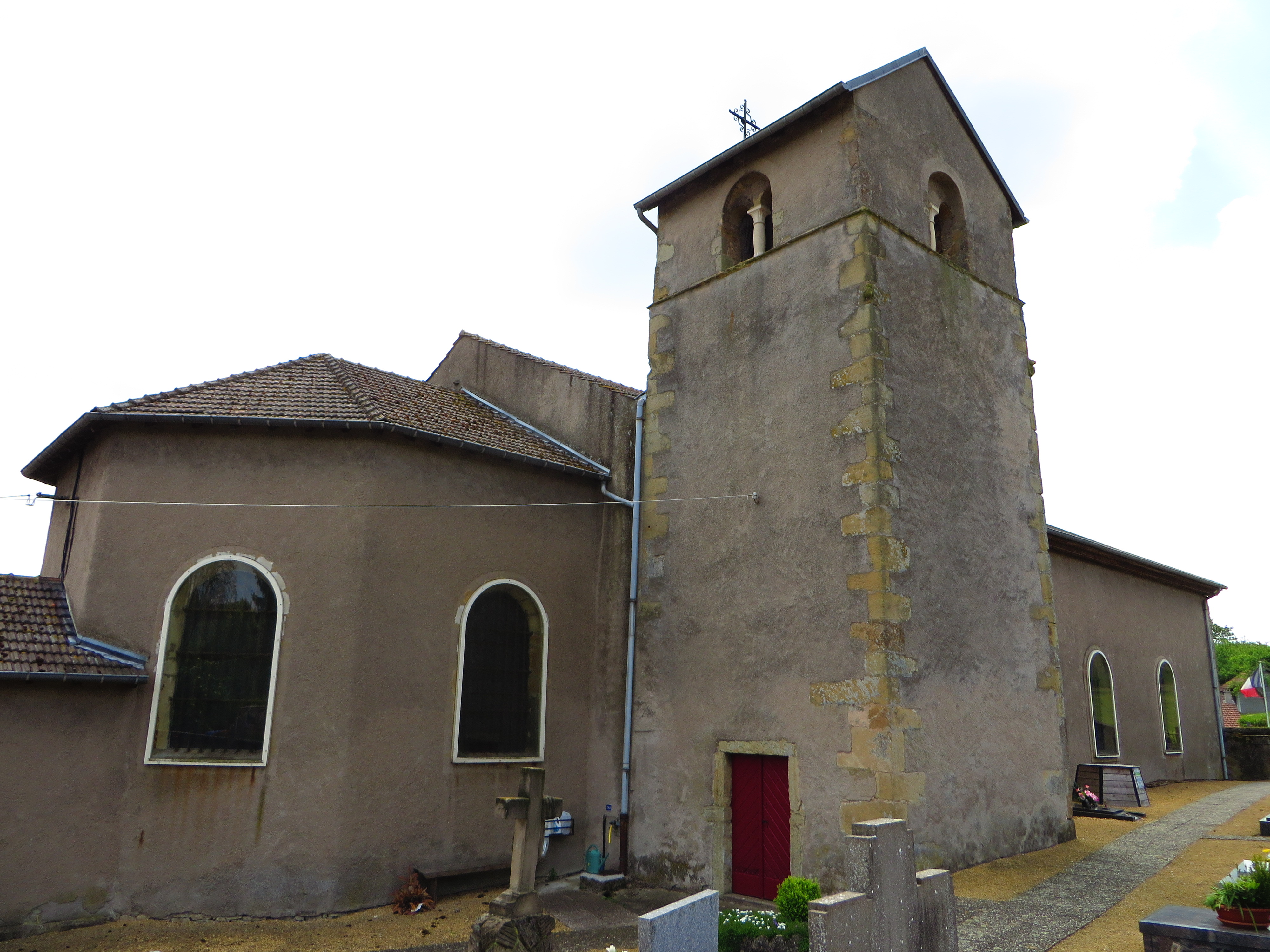 Marange Zondrange eglise